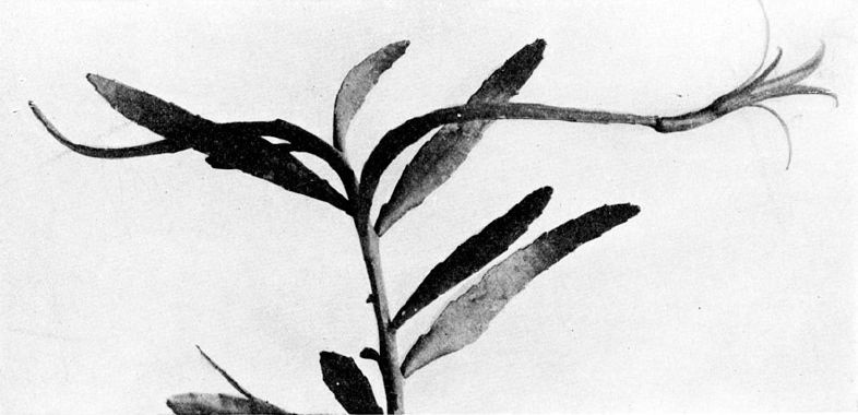 Disocactus biformis (Hylocereeae; Cactaceae; Planta) Nathaniel Lord Britton és Joseph Nelson Rose "The Cactaceae" c. könyvéből